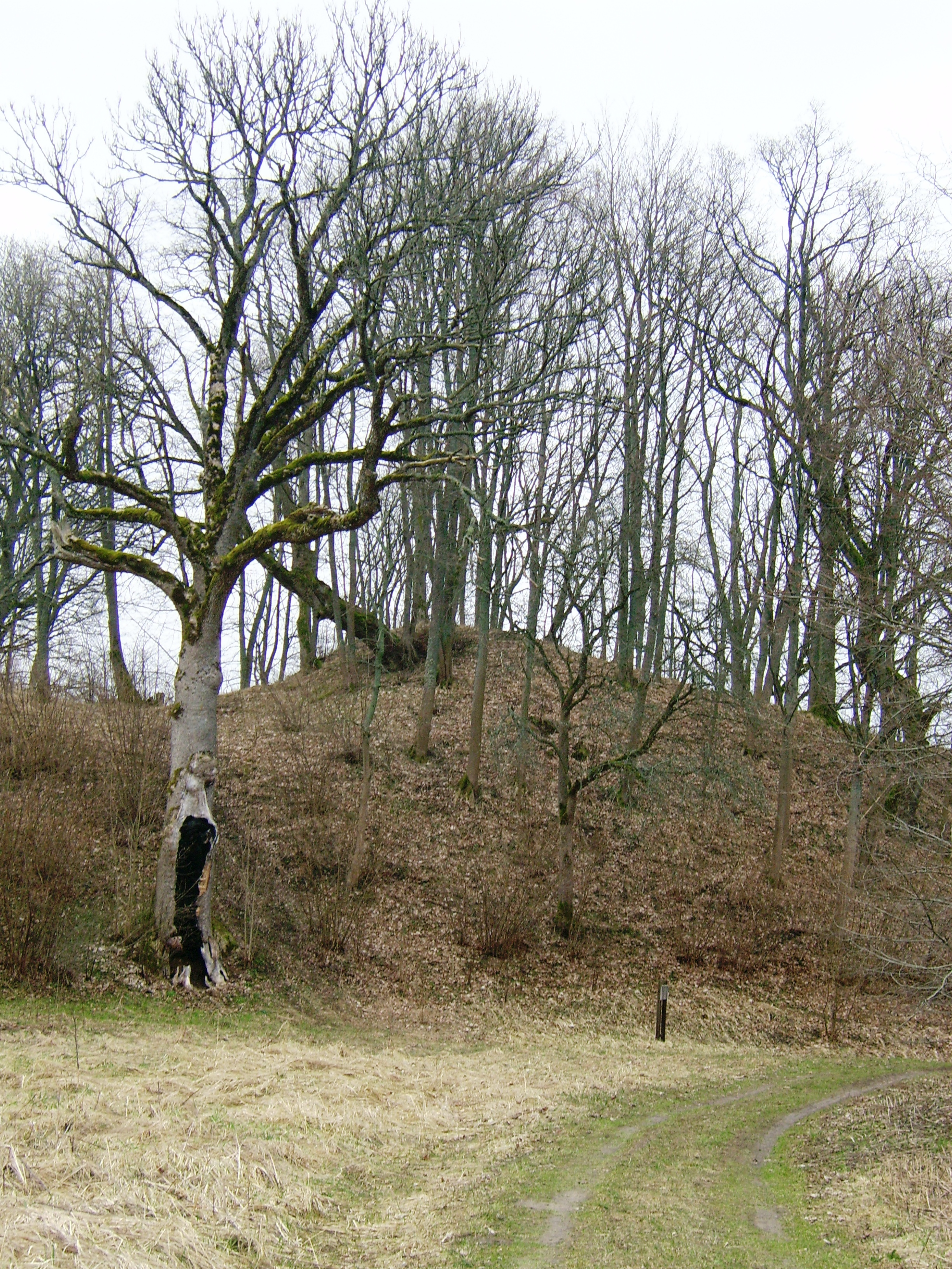 Matiškių piliakalnis